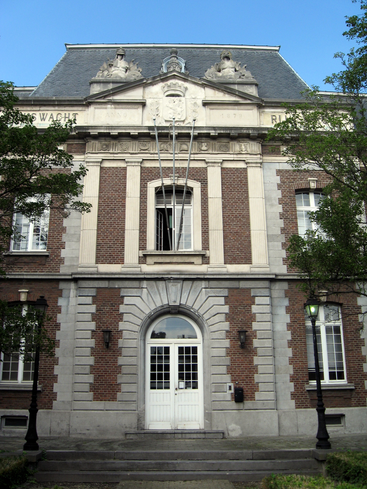 Rijkswachtkazerne van 1879 in Hasselt